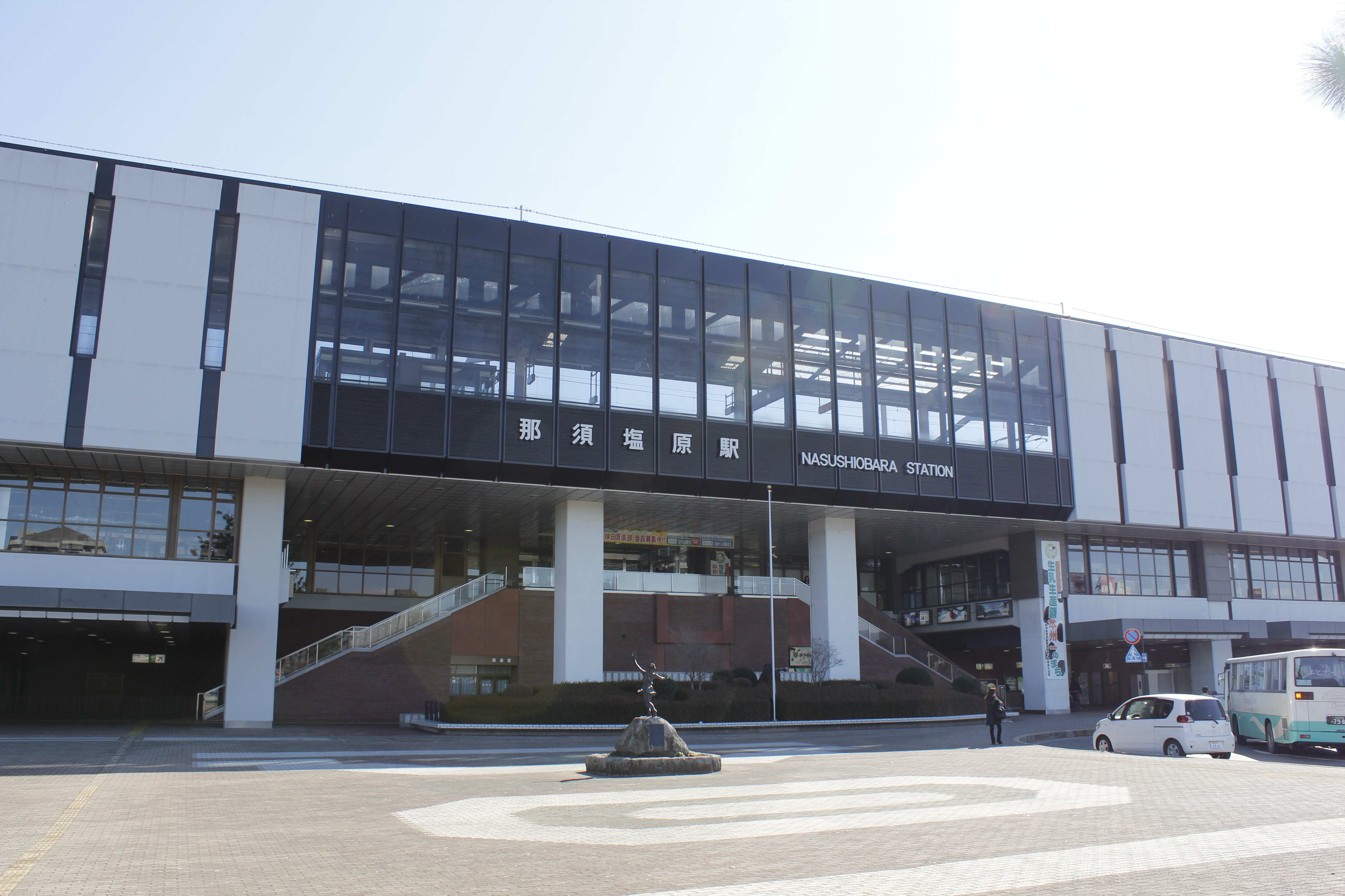 中央部に大きなガラス窓が組み込まれている、西口側。